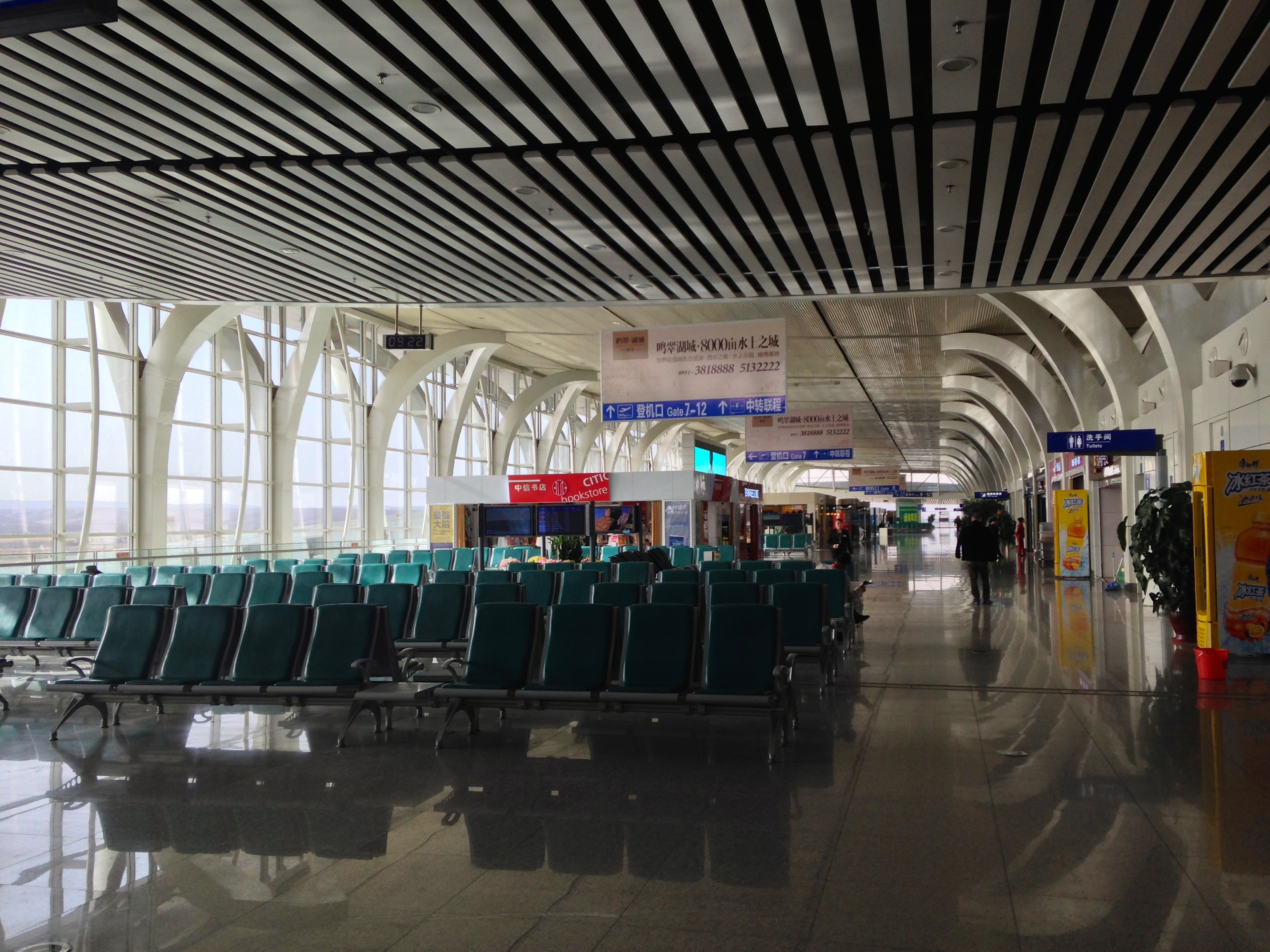 Lingwu, Yinchuan, Ningxia, China